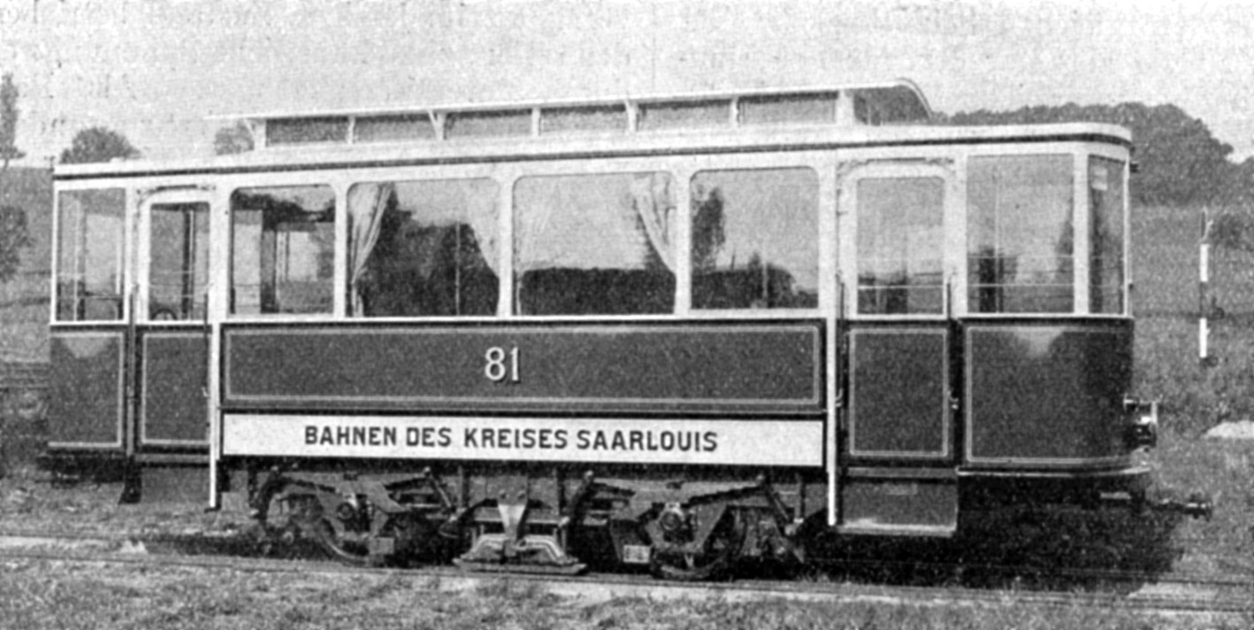 Original Bildunterschrift: "Anhängewagen mit aufklappbaren Sitzen für 22 Personen und 24 Stehplätzen mit zwei geschlossenen Plattformen für Marktverkehr. Ausrüstung mit Handbremse und elektrischer Schienenbremse."